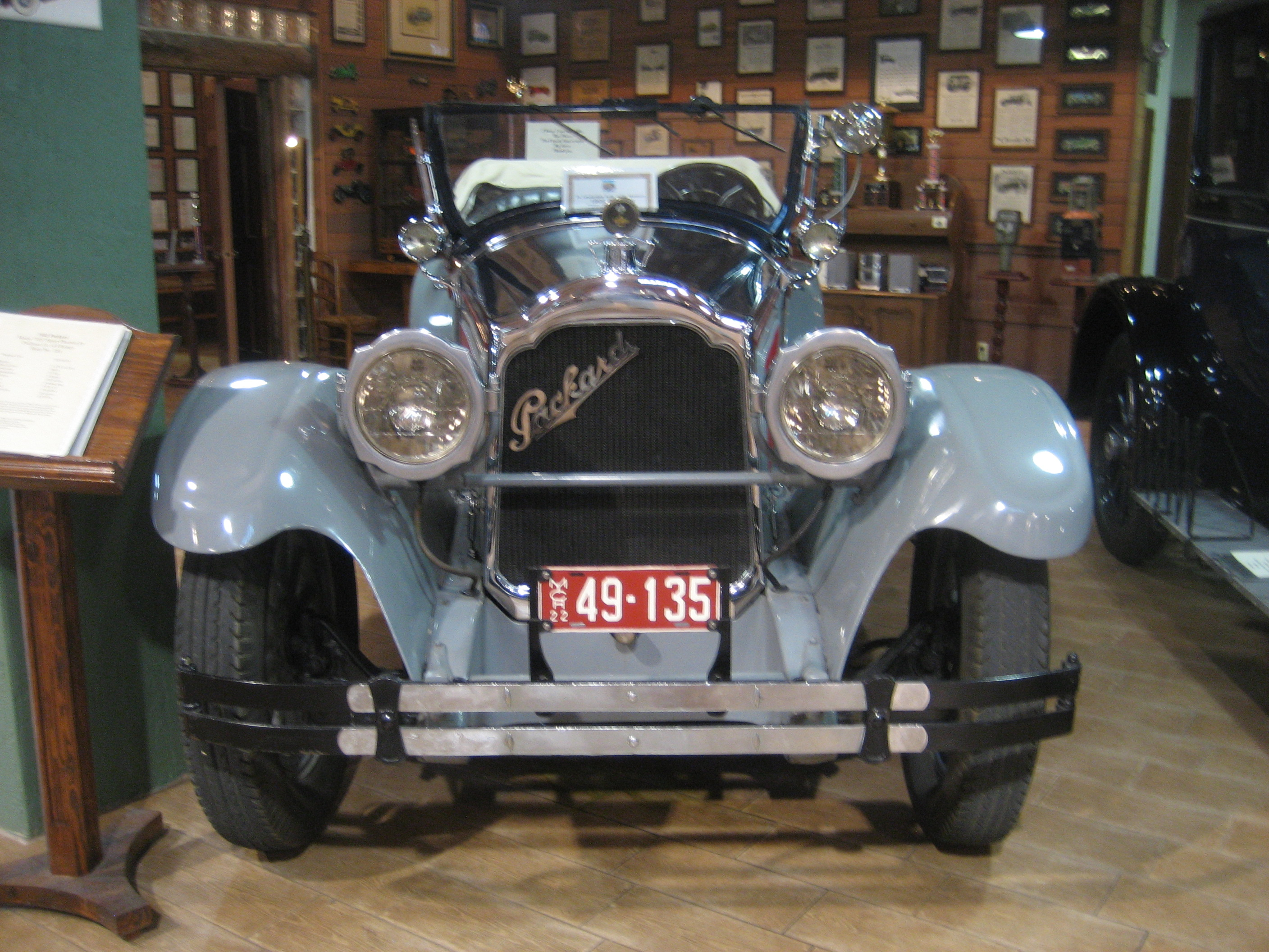 1922 Packard 126 Sport Phaeton. On display at Fort Lauderdale Antique Car Museum.